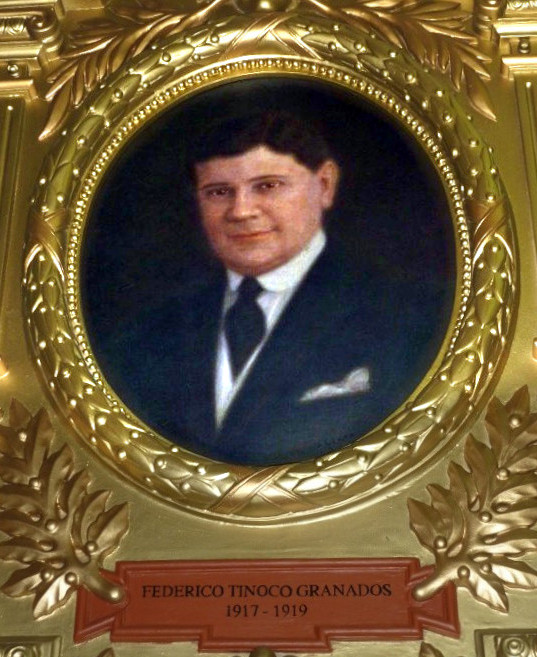 Federico Tinoco Granados Presidente de Costa Rica 1917-1919